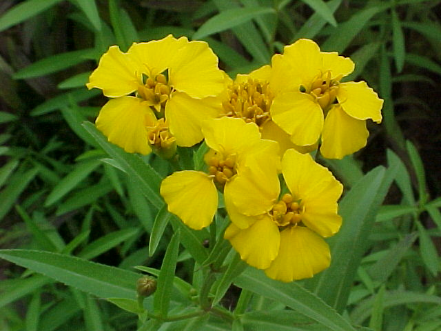 Tagetes lucida